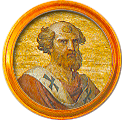 Médaillon de la frise des papes à Saint-Paul-hors-les-Murs. Il s'agit d'une mosaïque représentant Célestin II, 165e pape de l'Église catholique (1143-1144). Il fait parie de la série de médaillons voulue par Grégoire XVI destinée à remplacer ceux de l'ancienne basilique après l'incendie de 1823.